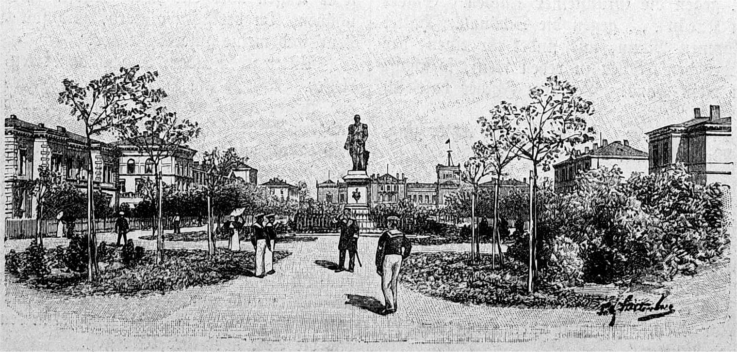 Adalbertstraße in Wilhelmshaven